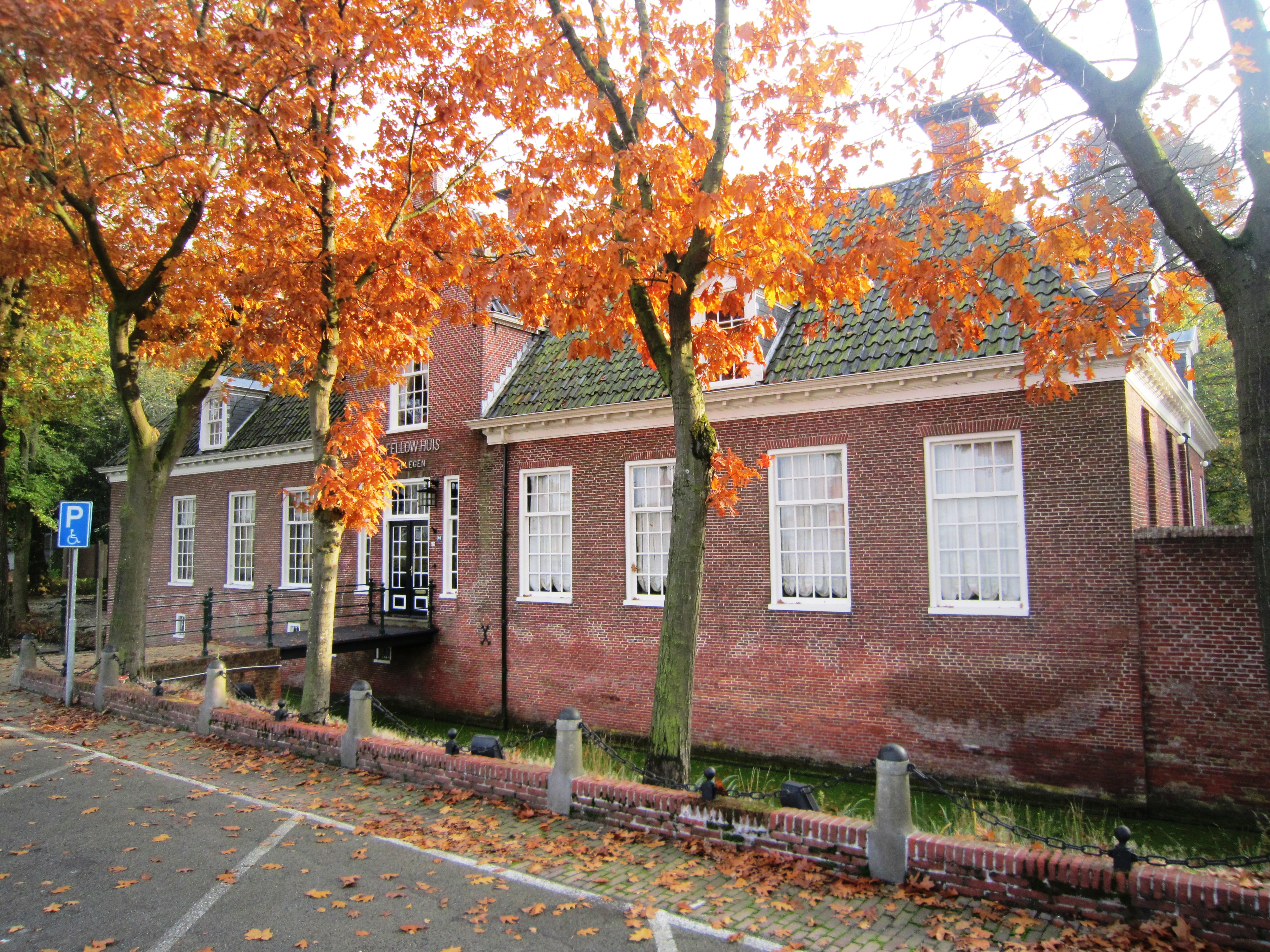 Borg Welgelegen